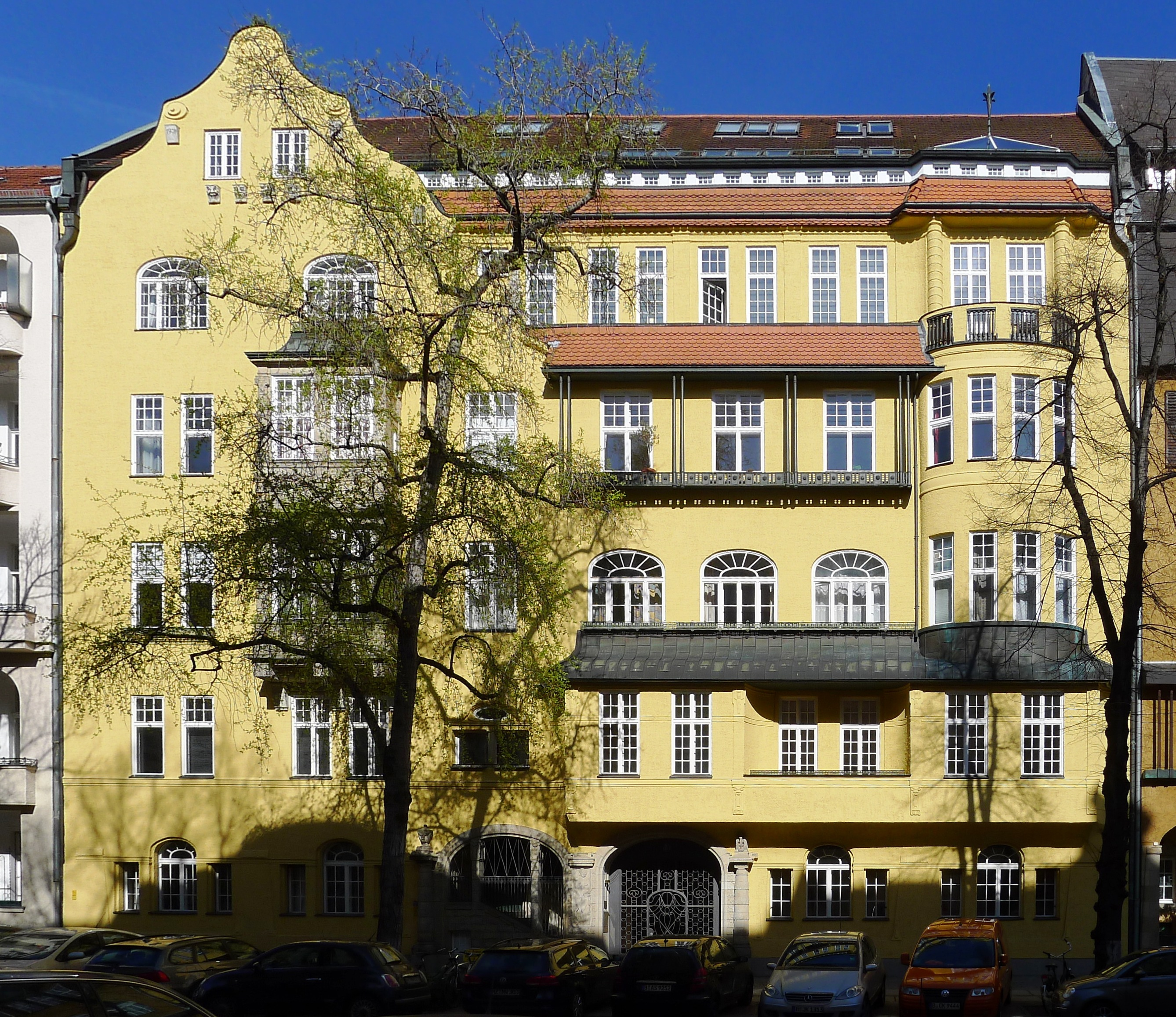 Mietshaus